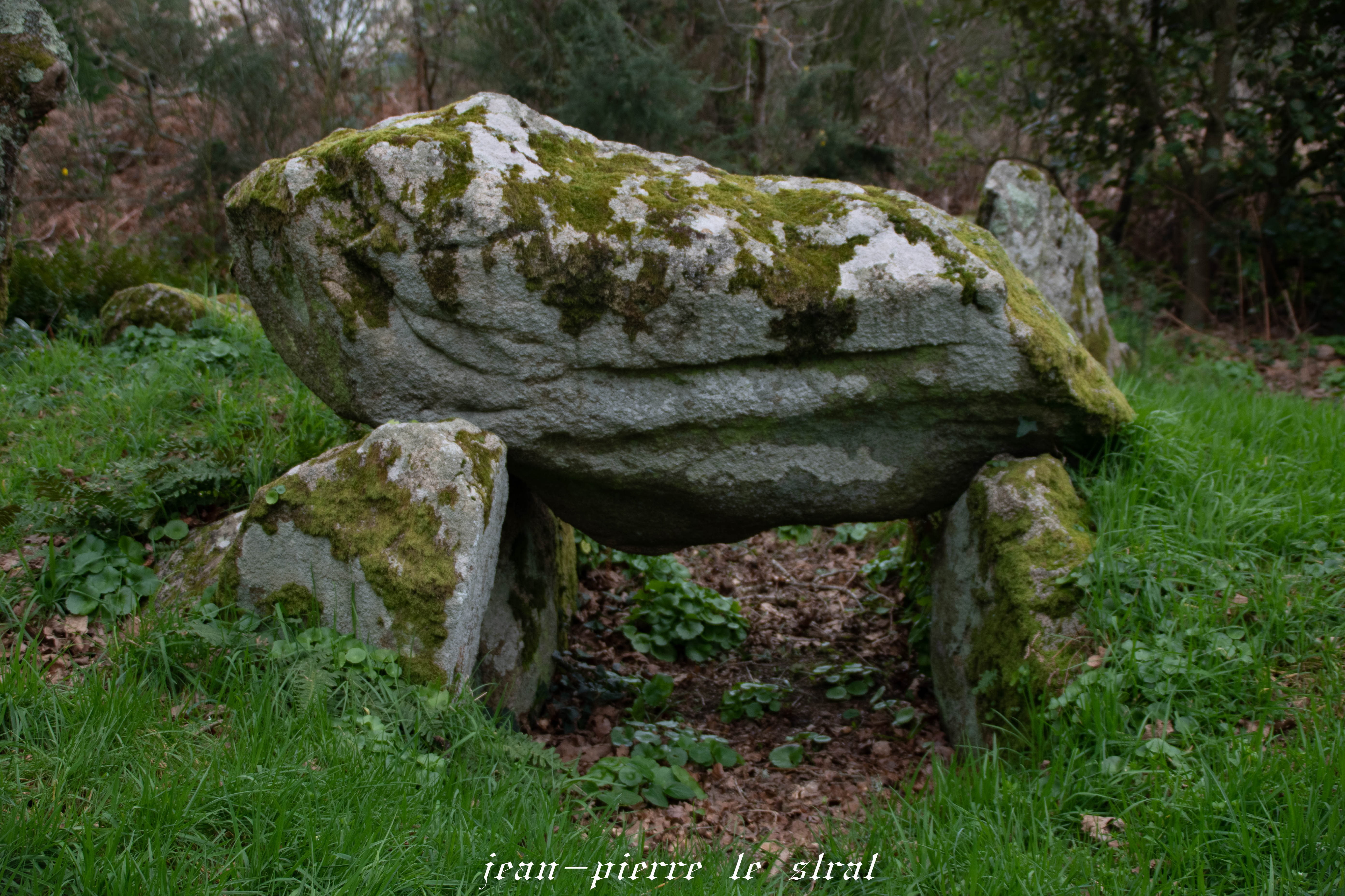 dolmen de kerguelen